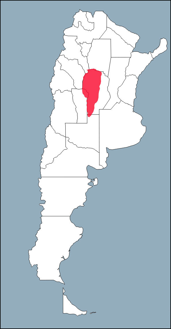 Distribucion de los comechingones en un mapa actual de la Republica Argentina